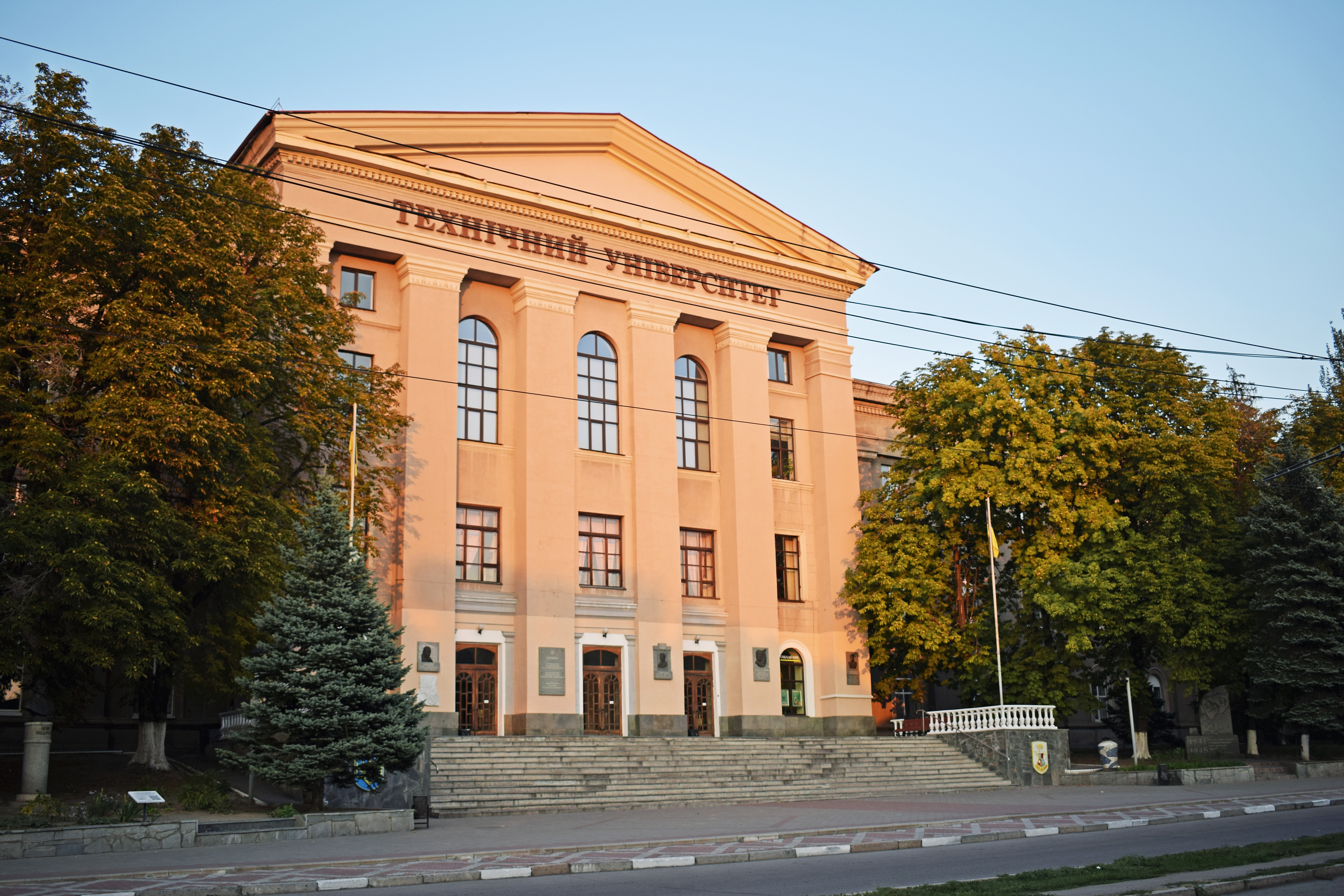 Механіко-технічне училище (зараз ЗДТІ), архітектор Р. Марфельд, в якому навчався Чубар В.Я., Запоріжжя, вул. Жуковського, 64/62